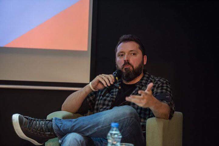 Srpskohrvatski / српскохрватски: Dragan Bursać, 2017.